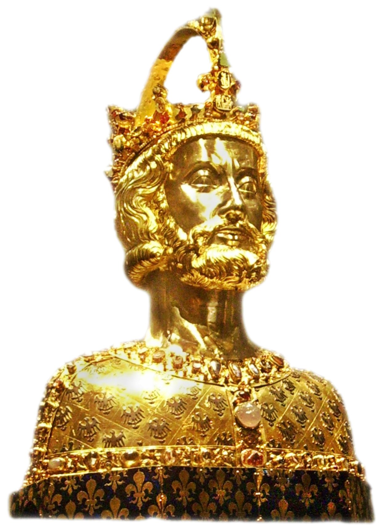 "Karlsbüste" Karls des Großen aus dem Domschatz des Aachener Doms. Vermutlich "nach 1349". Die Büste soll die Schädeldecke Karls des Großen enthalten [1].